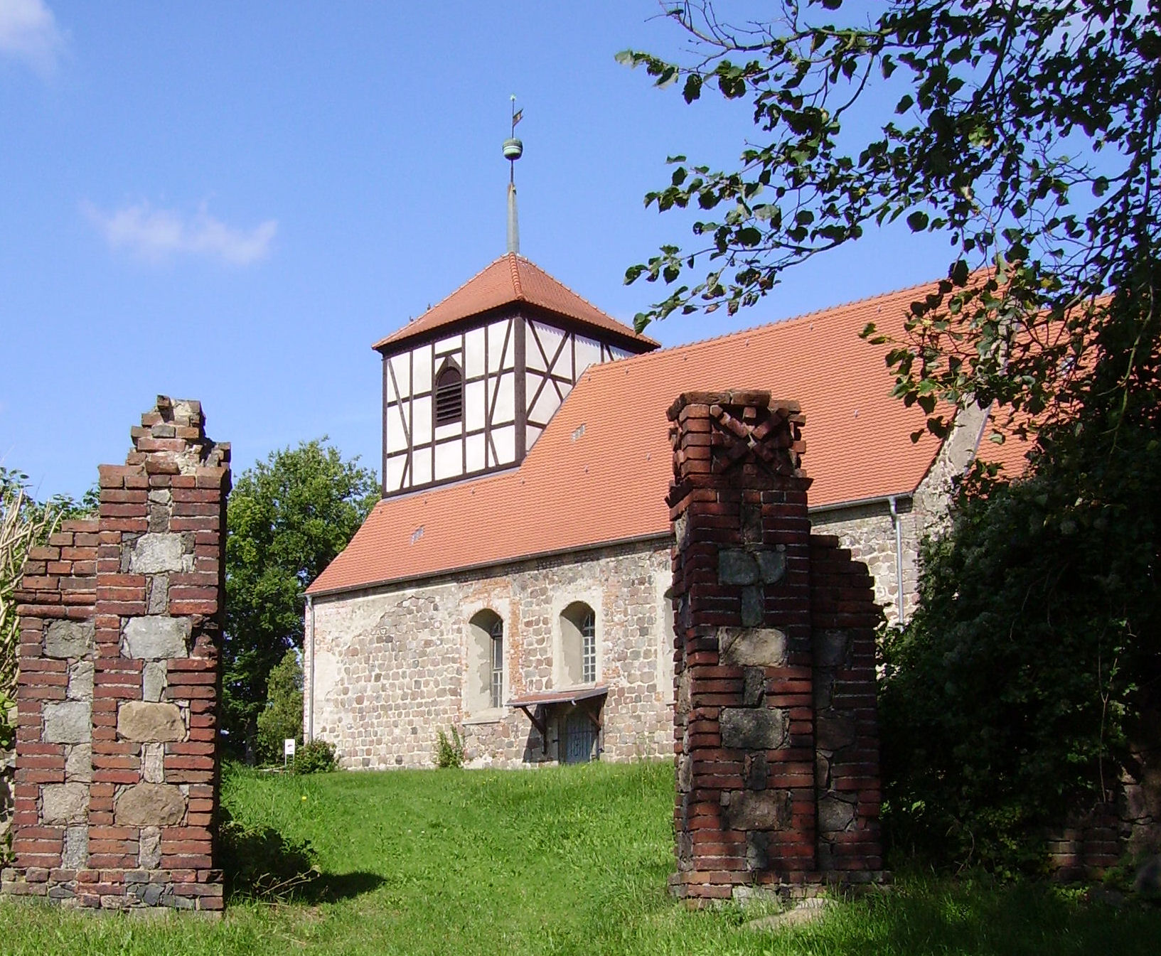 chapel of Gielsdorf in Brandenburg (Germany)